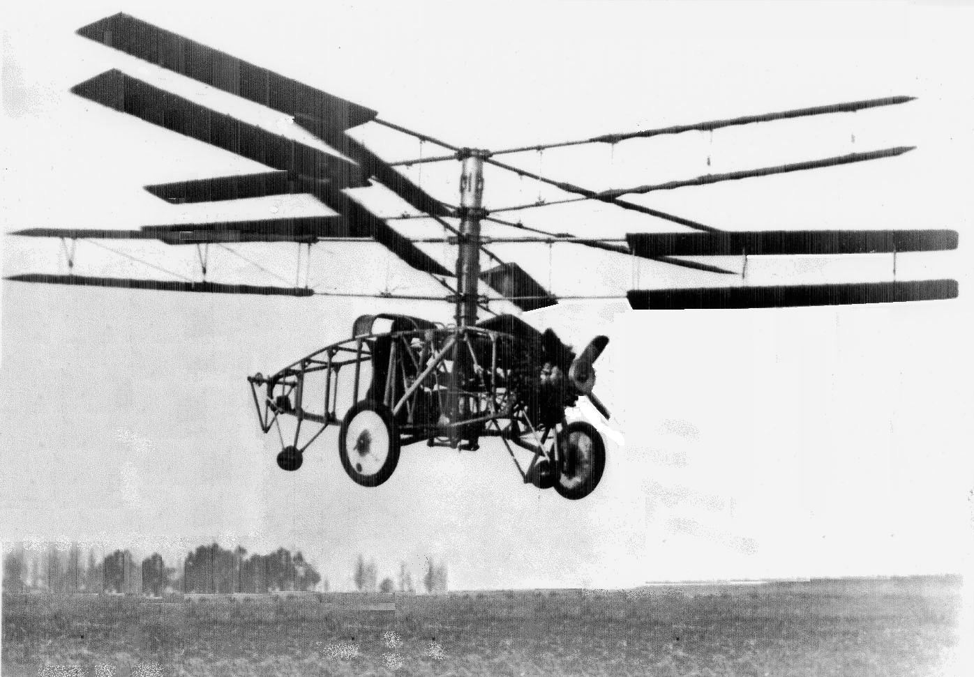 Hélicoptère Pescara 4S évoluant sur le terrain du Prat à Barcelone. Il est piloté par M. Pouit, ingénieur à l'usine de fabrication des Nacional Pescara. Le Pescara 4S ne pèse plus que 400 kg, équipé d'un moteur Salmson de 40 ch.